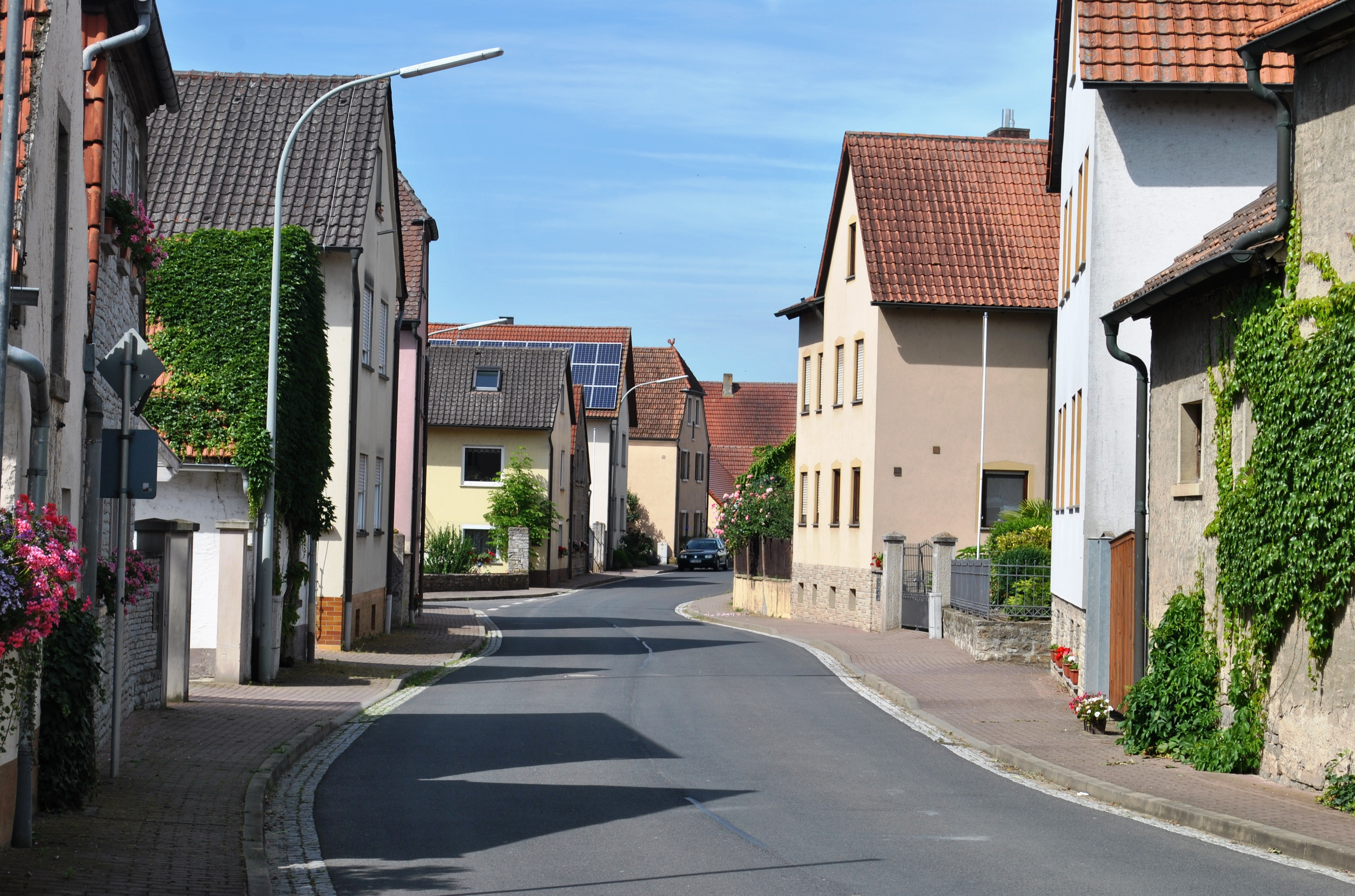 Untere Marienstraße